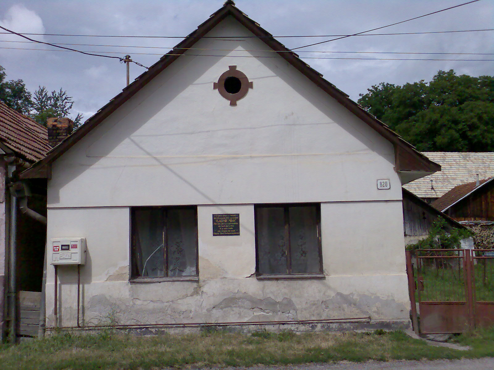 Rodný dom Vladimíra Mináča v Klenovci